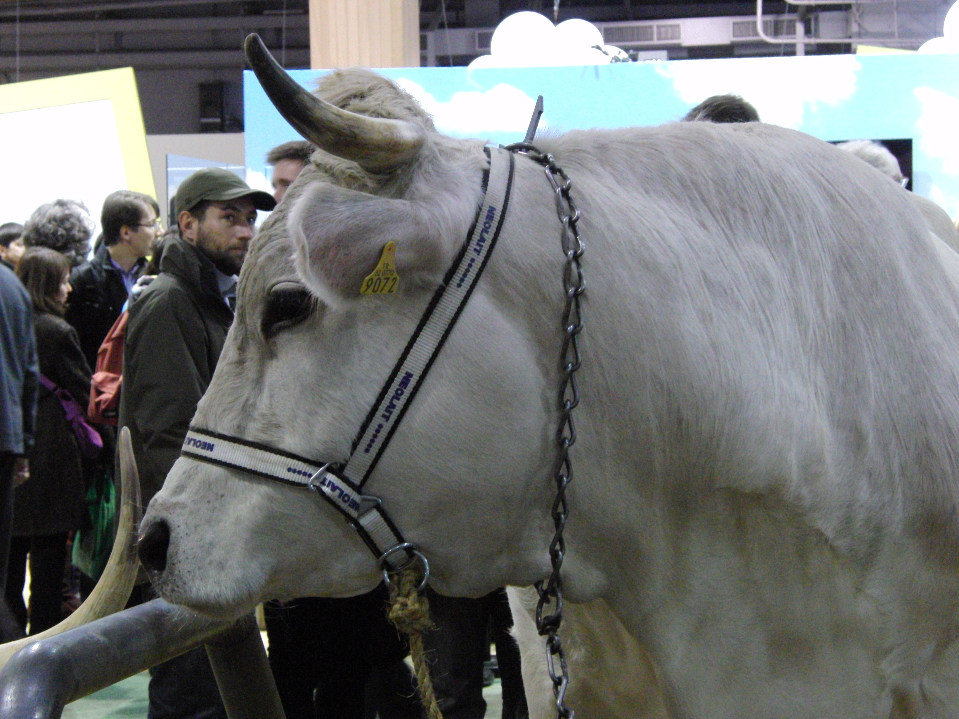 Vache Mirandaise (Gasconne Aréolée) - Salon international de l'agriculture 2013, Paris, France